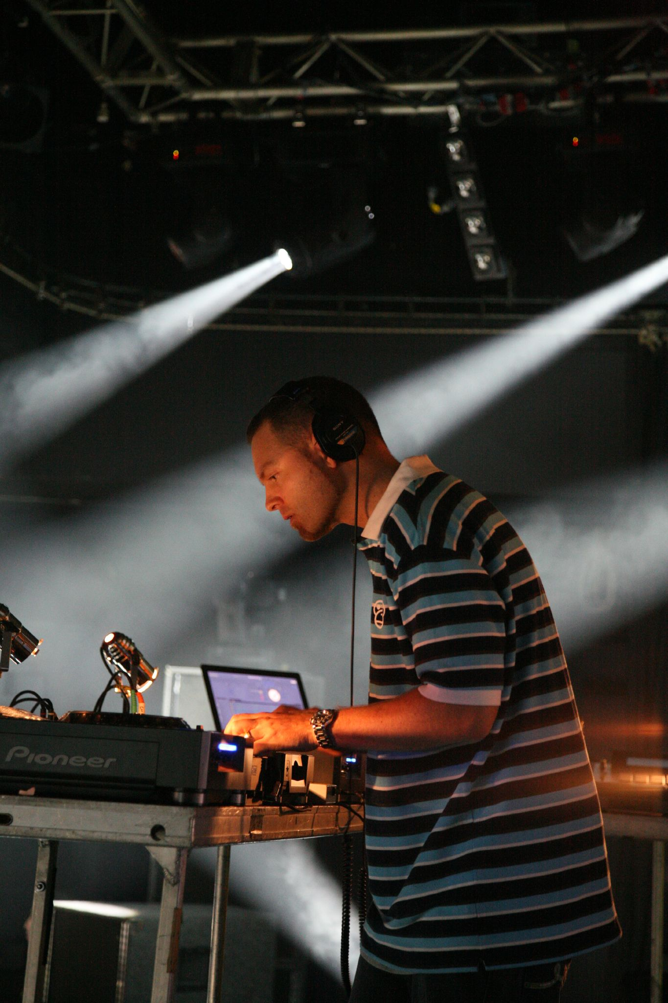 DJ Shadow